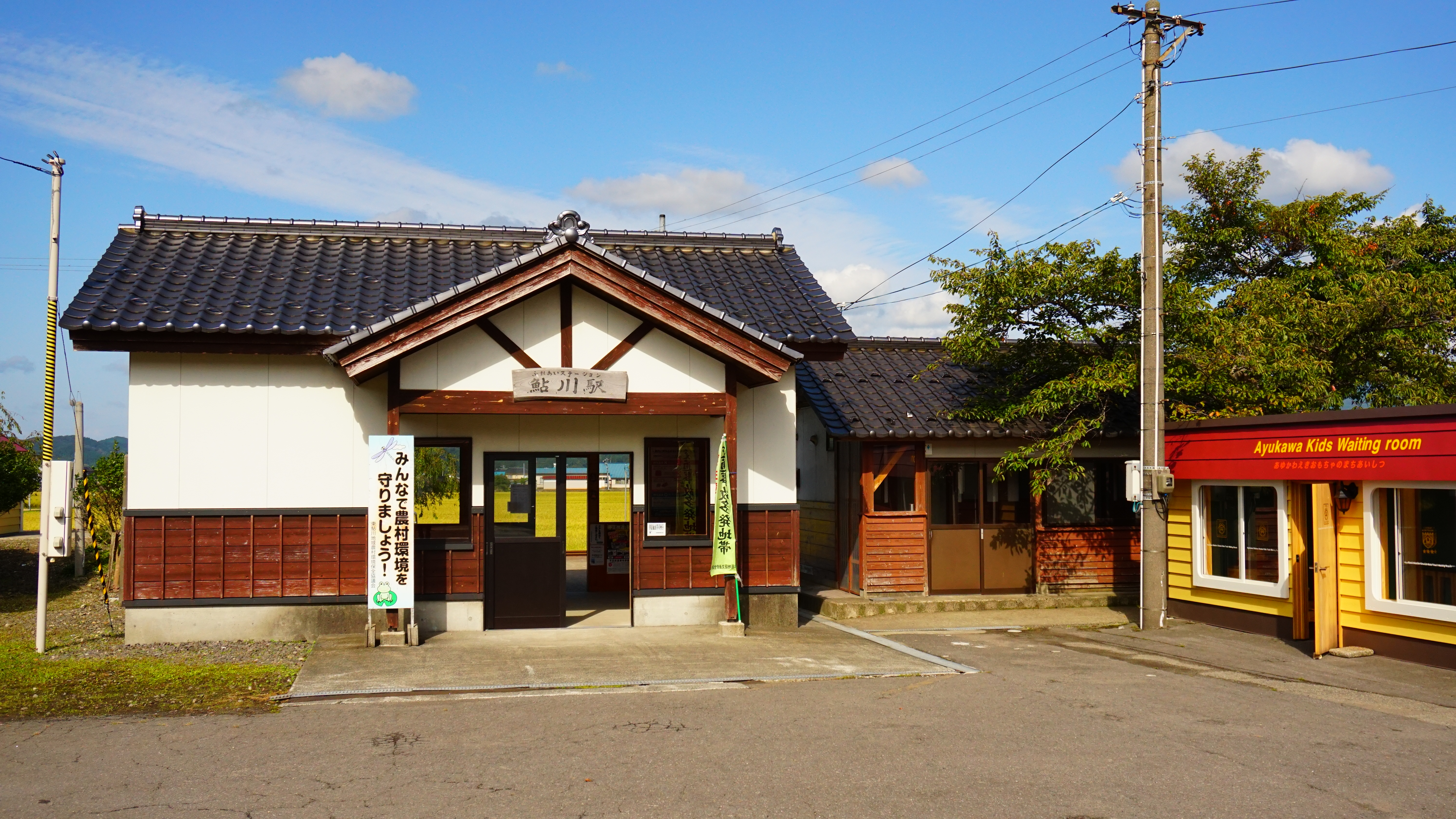 由利高原鉄道 鮎川駅（秋田県由利本荘市）。2018年7月の「鳥海山木のおもちゃ美術館」（旧鮎川小学校）の開園に合わせ、駅舎脇の駐輪場が子供向けの待合室として改装された。